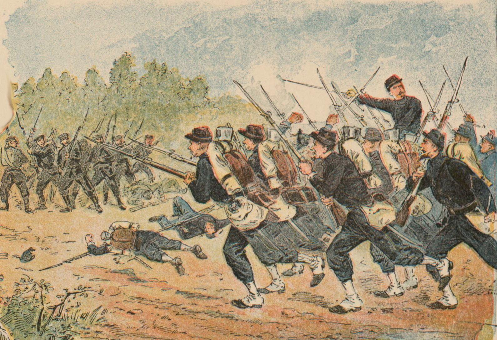 Illustration française du 10e bataillon de chasseurs à pied à Spickeren (6 août 1870)